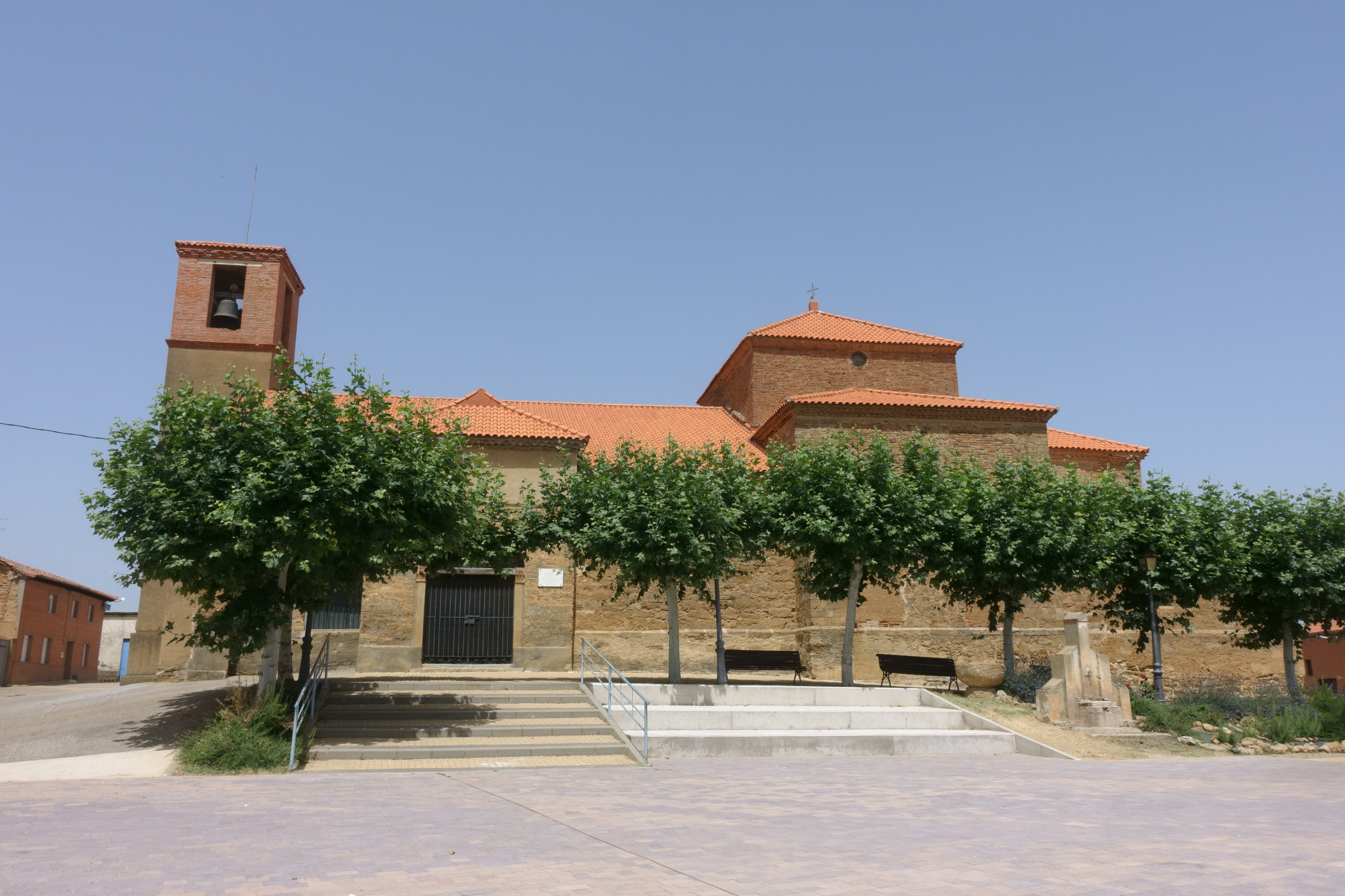 Iglesia de San Salvador, Matilla de Arzón (Zamora, España).